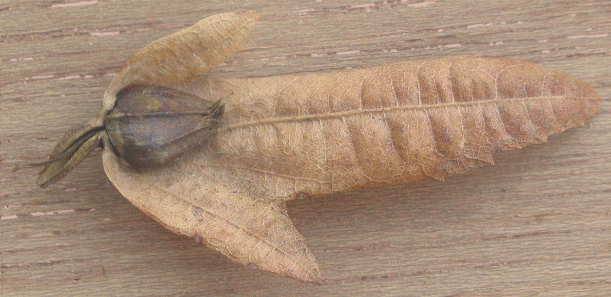 (Haagbeuk vrucht) Carpinus betulus fruit